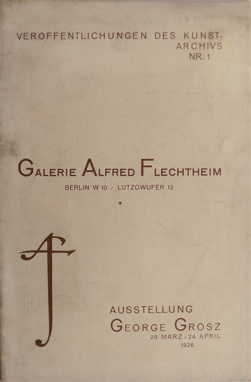 Galerie Alfred Flechtheim: Ausstellung George Grosz 29. März - 24. April 1926. Katalog. Mit 24 Abbildungen nach George Grosz. (= Veröffentlichungen des Kunstarchivs, Nr. 1)